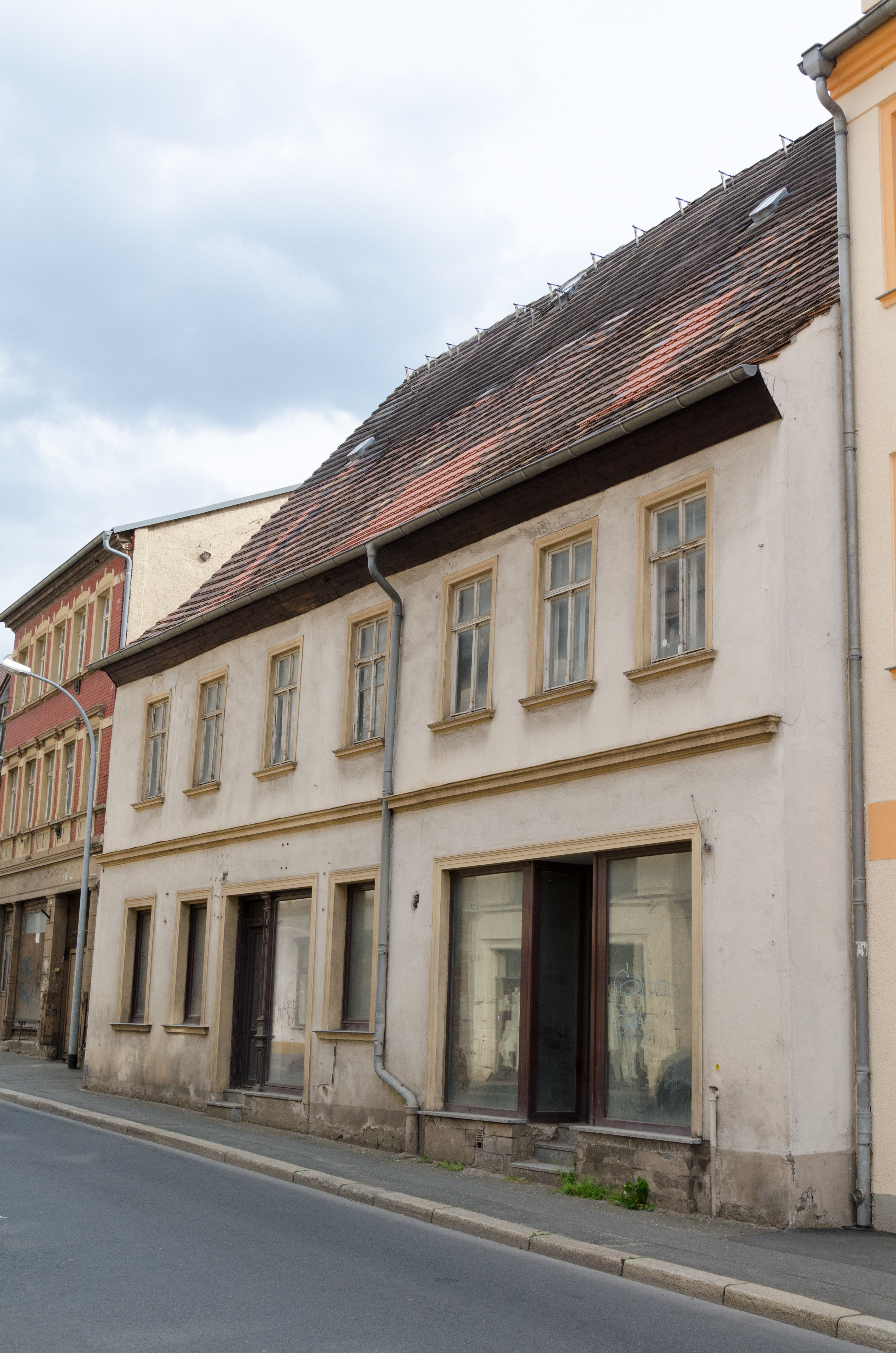 Zeitz, Kalkstraße 9